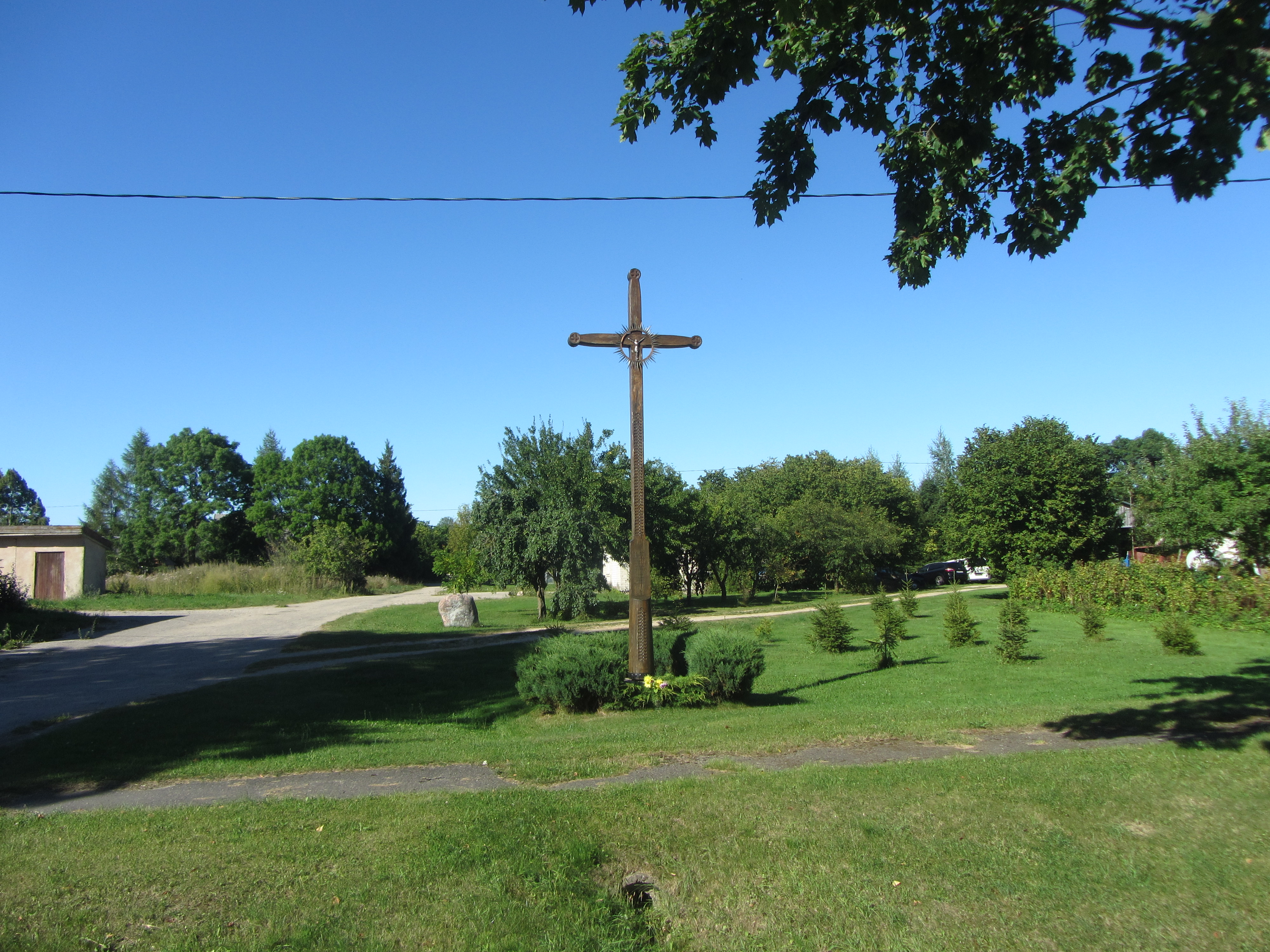 Keginiai 40313, Lithuania